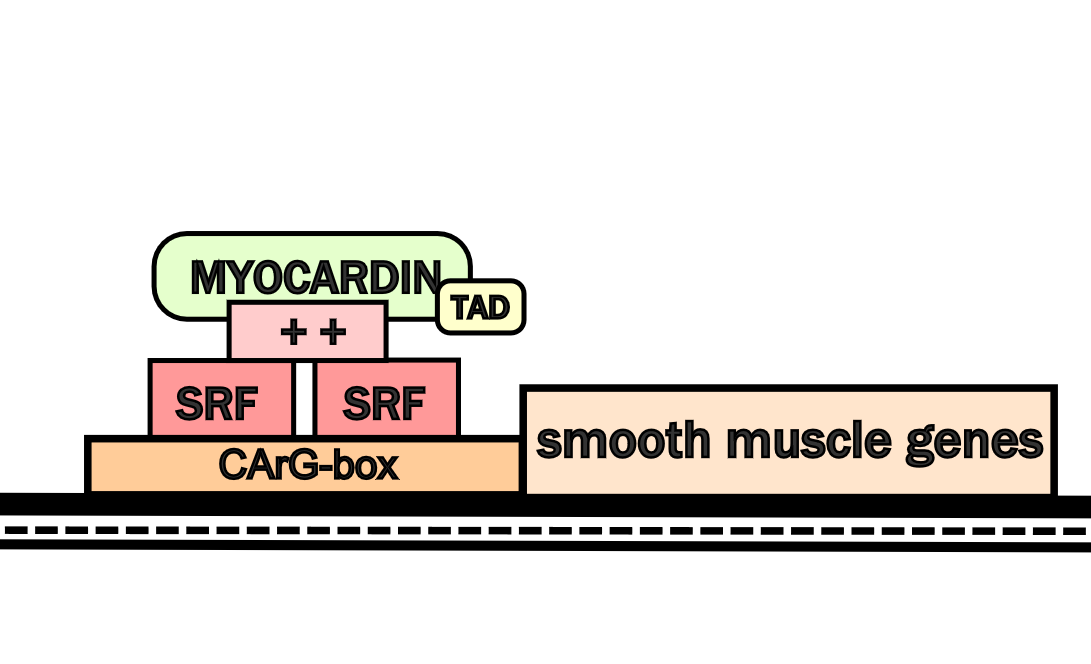 Schematic image of miocardin-madiated proliferation smooth muscle cells